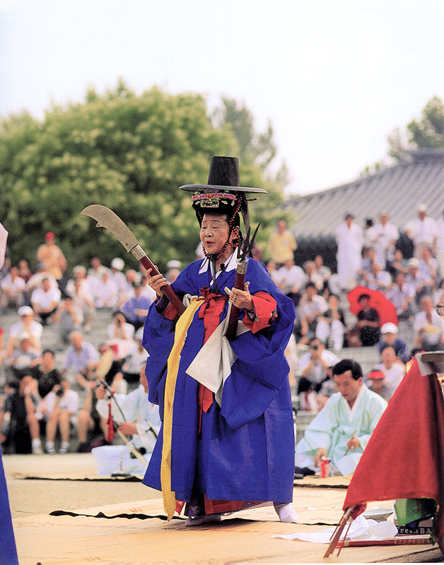 서울 새남굿은 사회 상류층이나 부유층에서 죽은사람을 넋을 위로하고 좋은 세상으로 인도하기 위해 행했던 서울지역의 전통적인 망자천도굿이다. 새남굿은 조선시대에 형성되었다가 17·18세기경에 오늘날의 형태로 행해졌던 것으로 보인다.